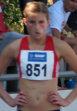 Inna Weit beim Olympia-Qualifikationswettkampf 2012 im Stadion der MTG Mannheim.